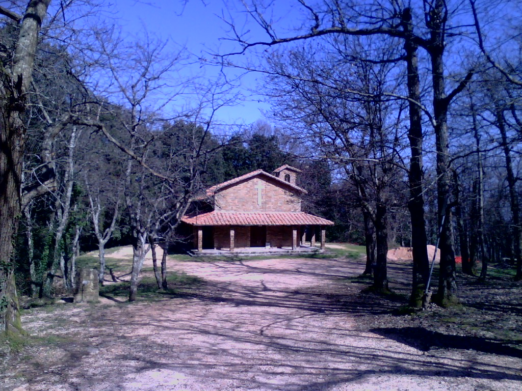 Eremo di Sant'Anna nel bosco, presso Tirli (Grosseto)